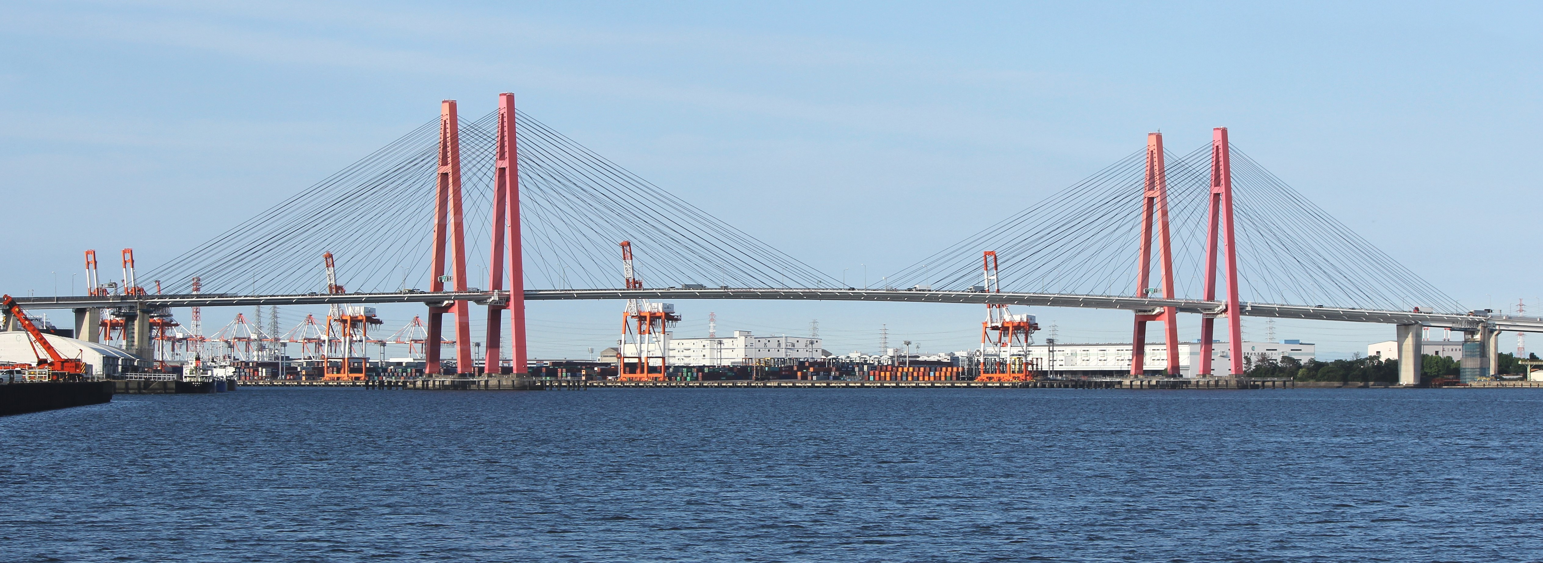 名港西大橋と飛島ふ頭コンテナ基地（稲永ふ頭から撮影）